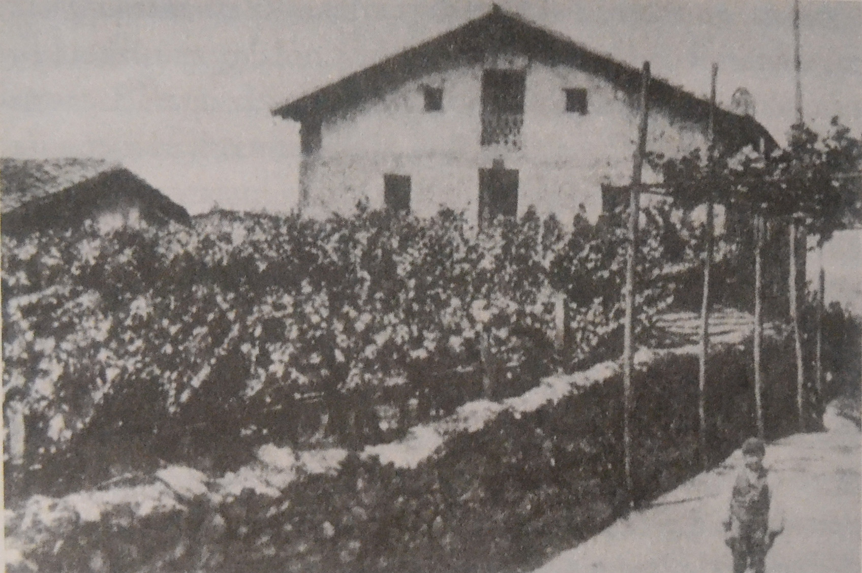 Larrazabalgo baserri-txakolindegia XIX. mendearen amaieraldera. Larrazabal farm-txakolin house in the XIX century last years.